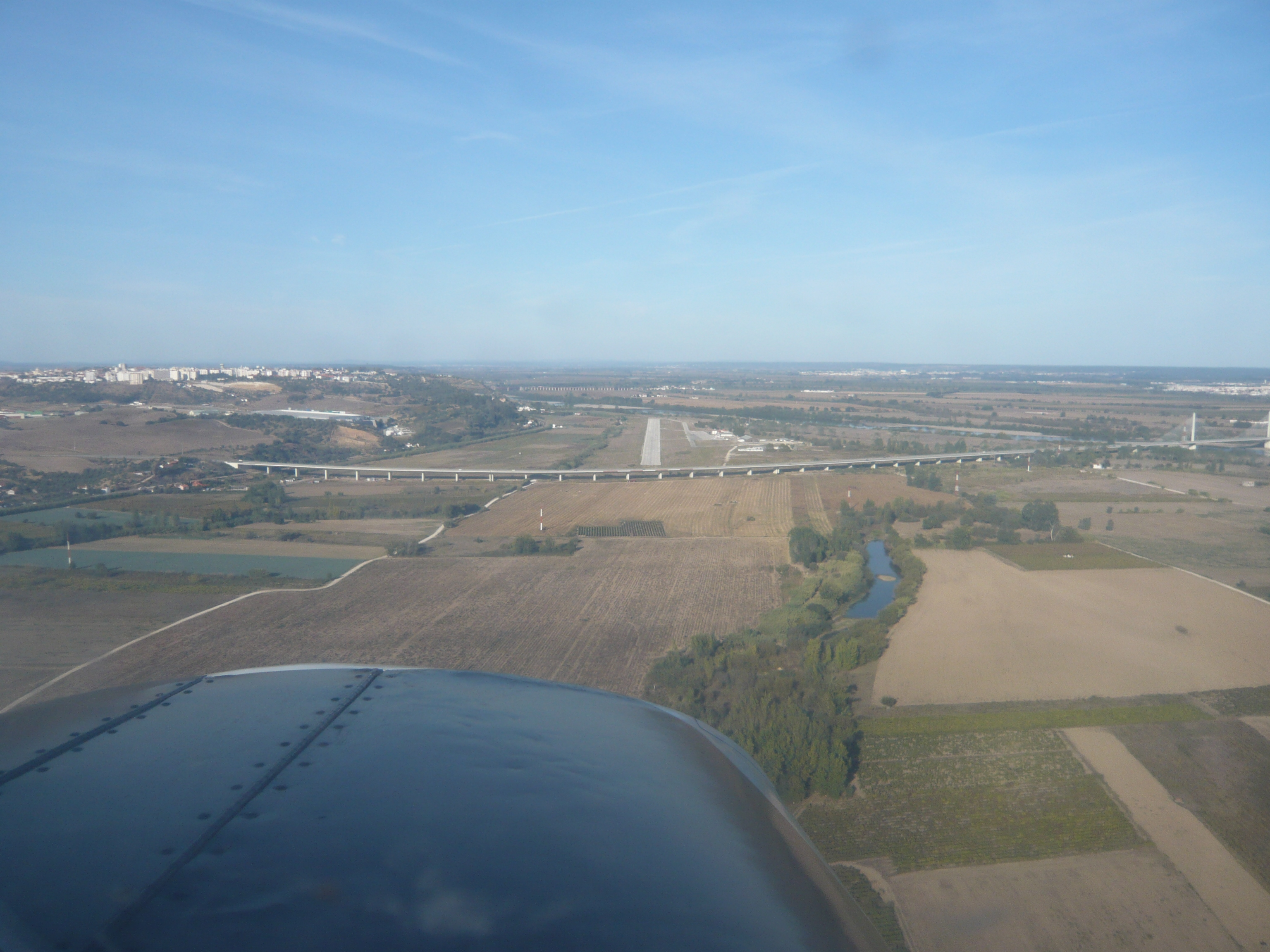 Aproximação à pista